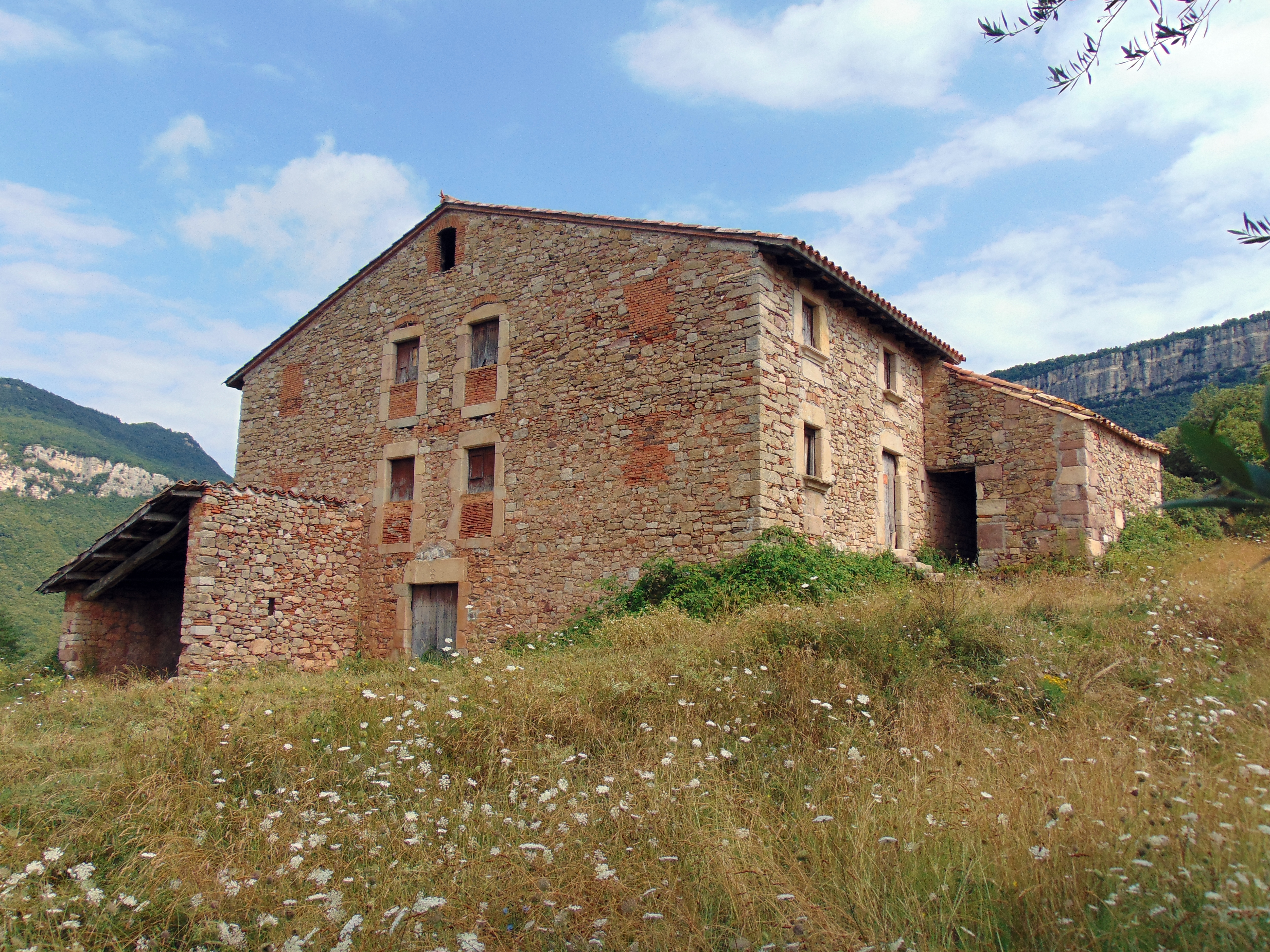 Capella de Sant Pau de Fornils (Susqueda)